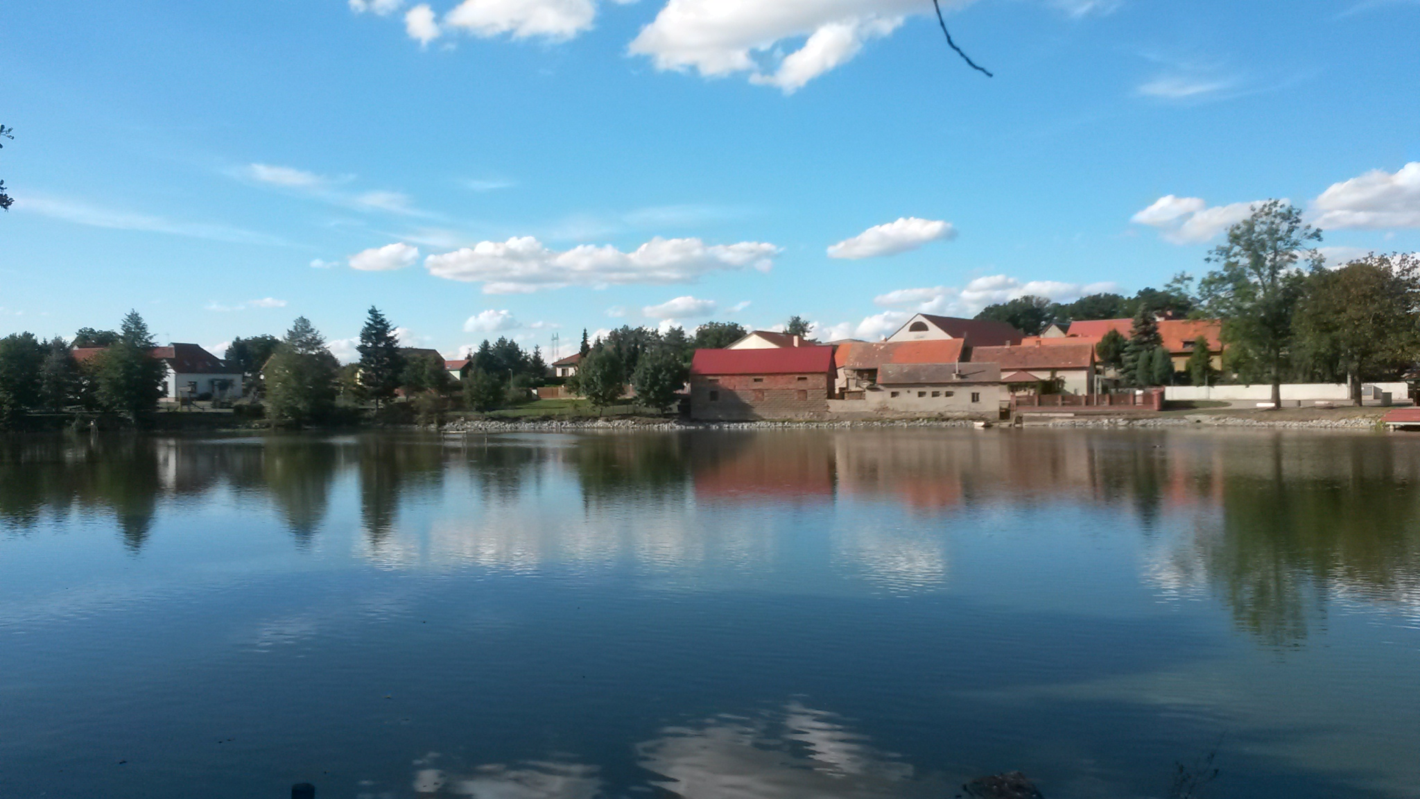 Libeň, Libeř rybník na návsi